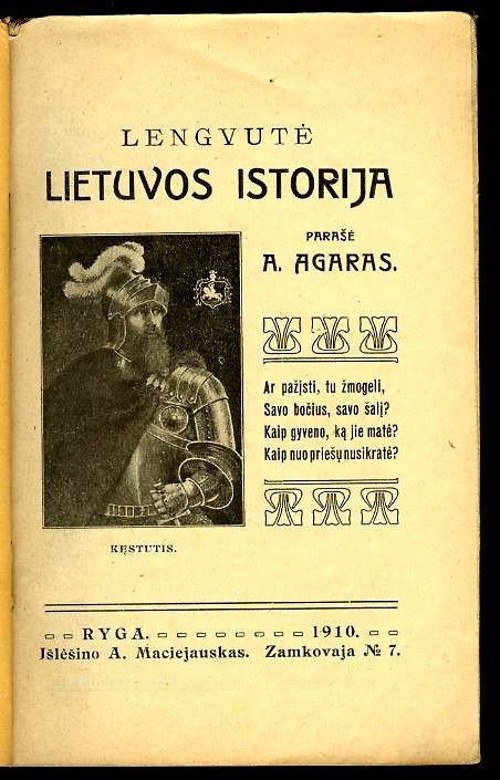 A. Agaras (= Antanas Macijauskas): Lengvutė Lietuvos istorija, 1910.